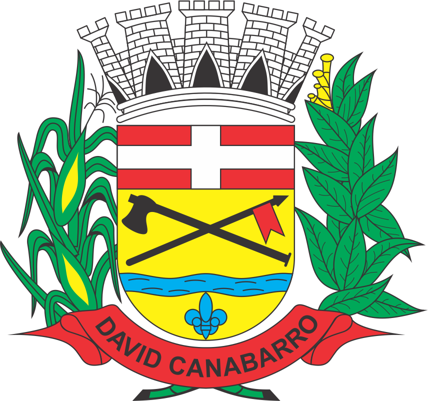 Brasão de David Canabarro (Rio Grande do Sul)